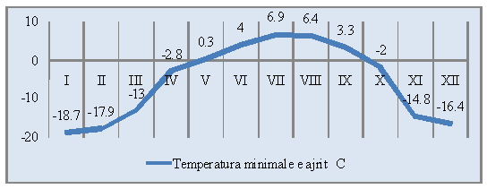 vecori te klimes